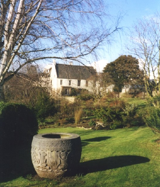 Inveresk Lodge Garden, Inveresk